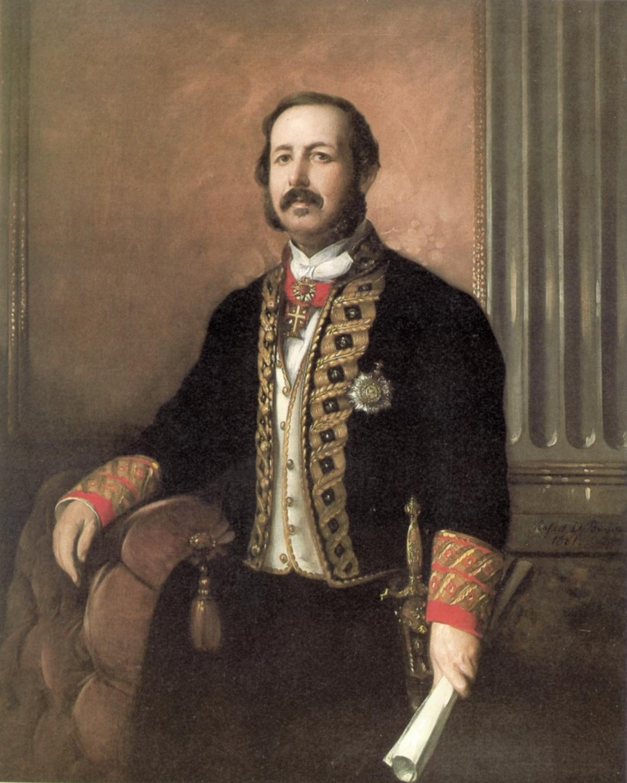 Retrato de Juan Bautista Trúpita (1815-1873). Gobernador del Banco de España octubre de julio de 1866 a octubre de 1868.